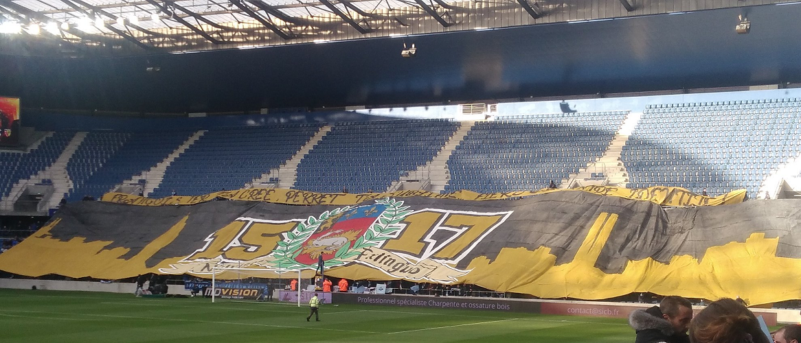 Tifo des supporters Havrais lors du match Le Havre AC - RC Lens